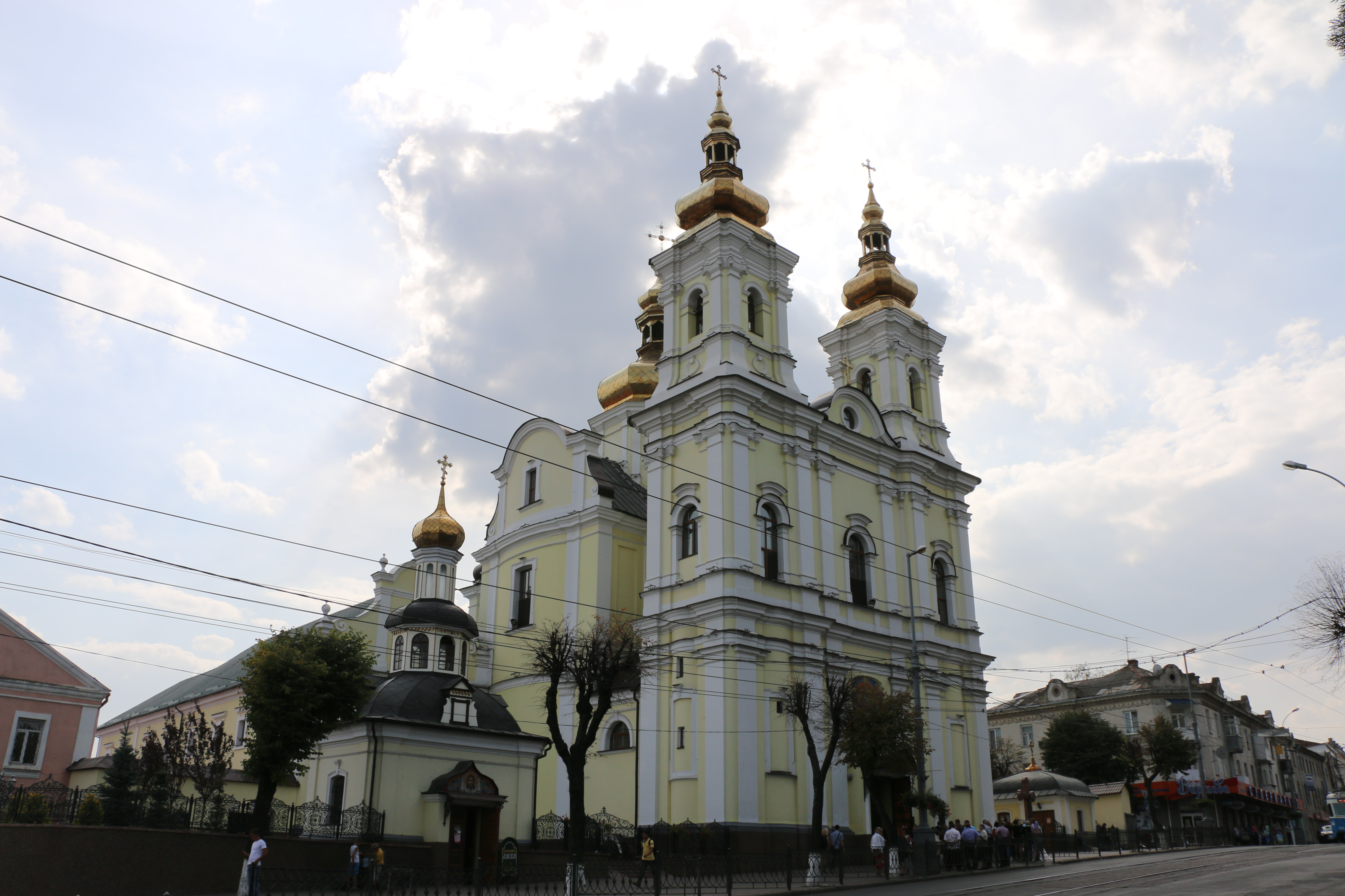 Домініканський монастир - Костьол, Вінниця, вул. Соборна, 23